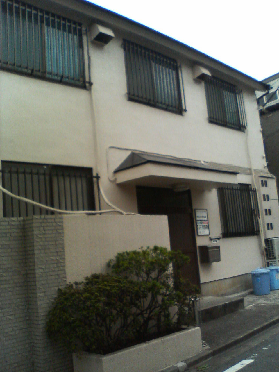 日本文学協会全体図